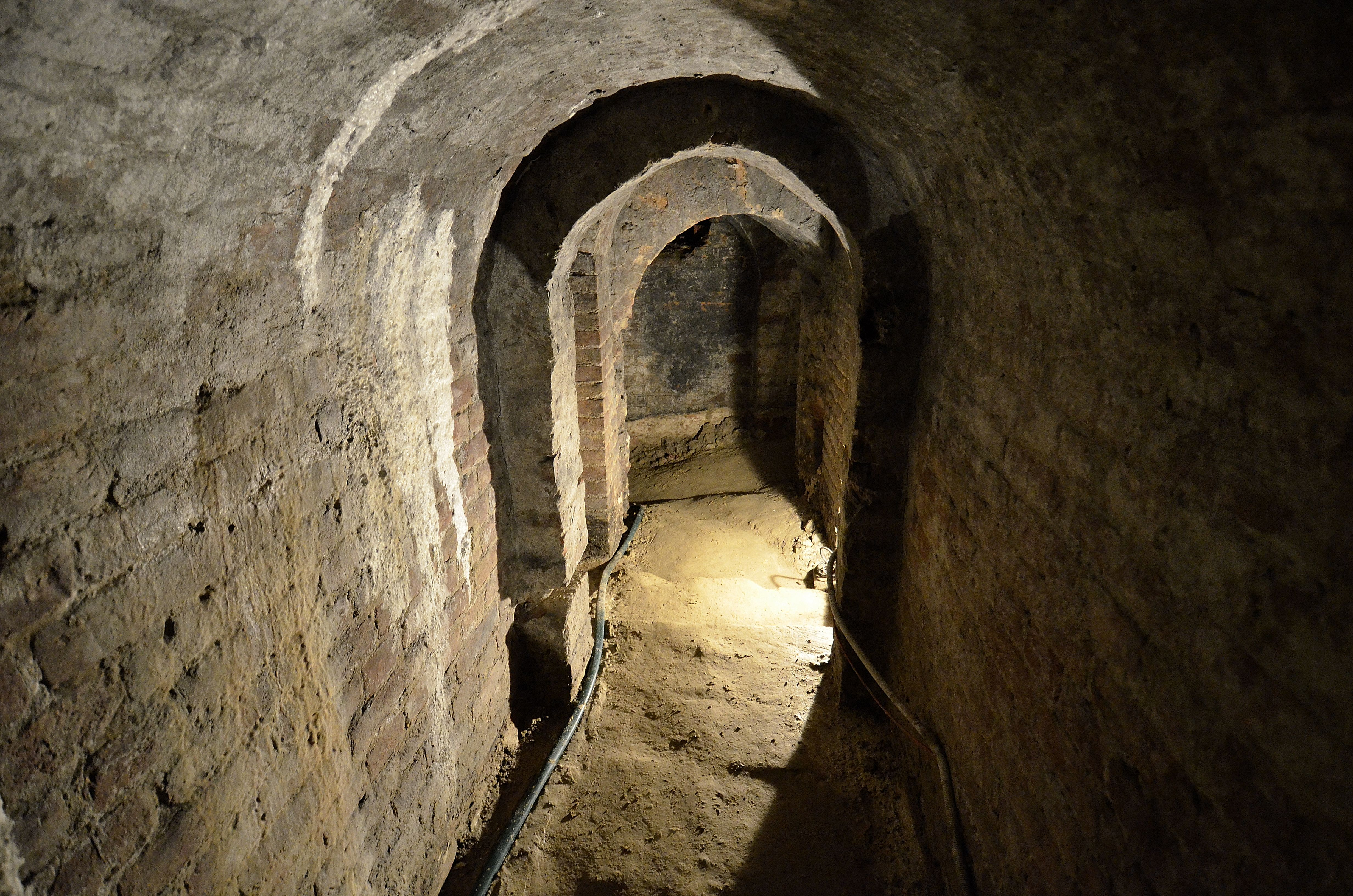 Podziemia Fortu Legionów (d. Władymira) Cytadeli Warszawskiej